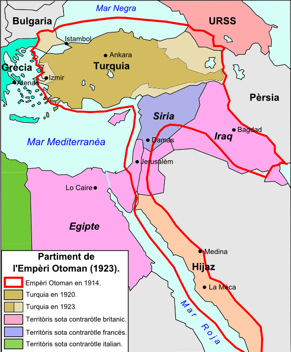 Partiment de l'Empèri Otoman en 1923.